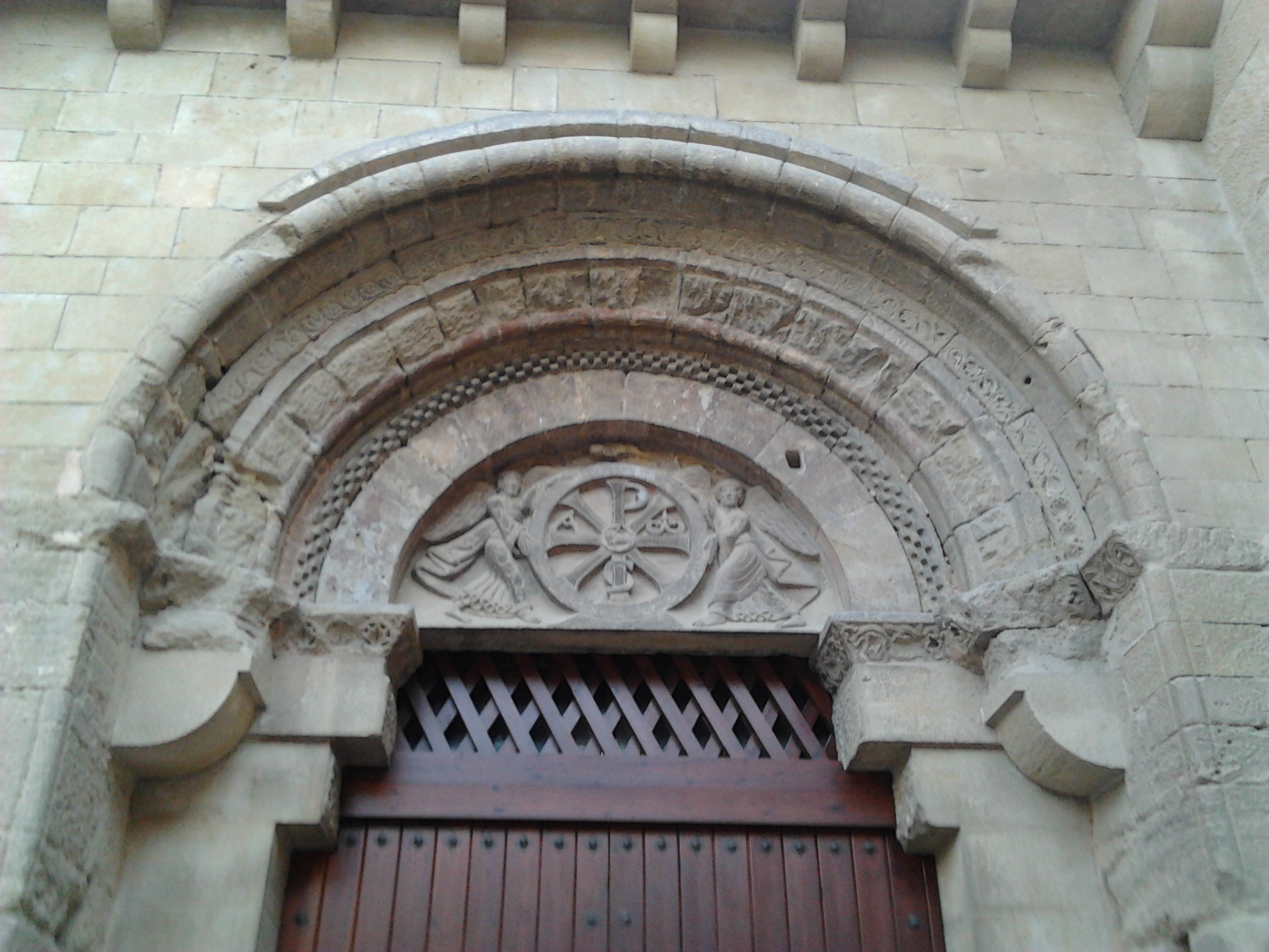 Esglesia de Sant Pere el Vell, Osca (Arago)